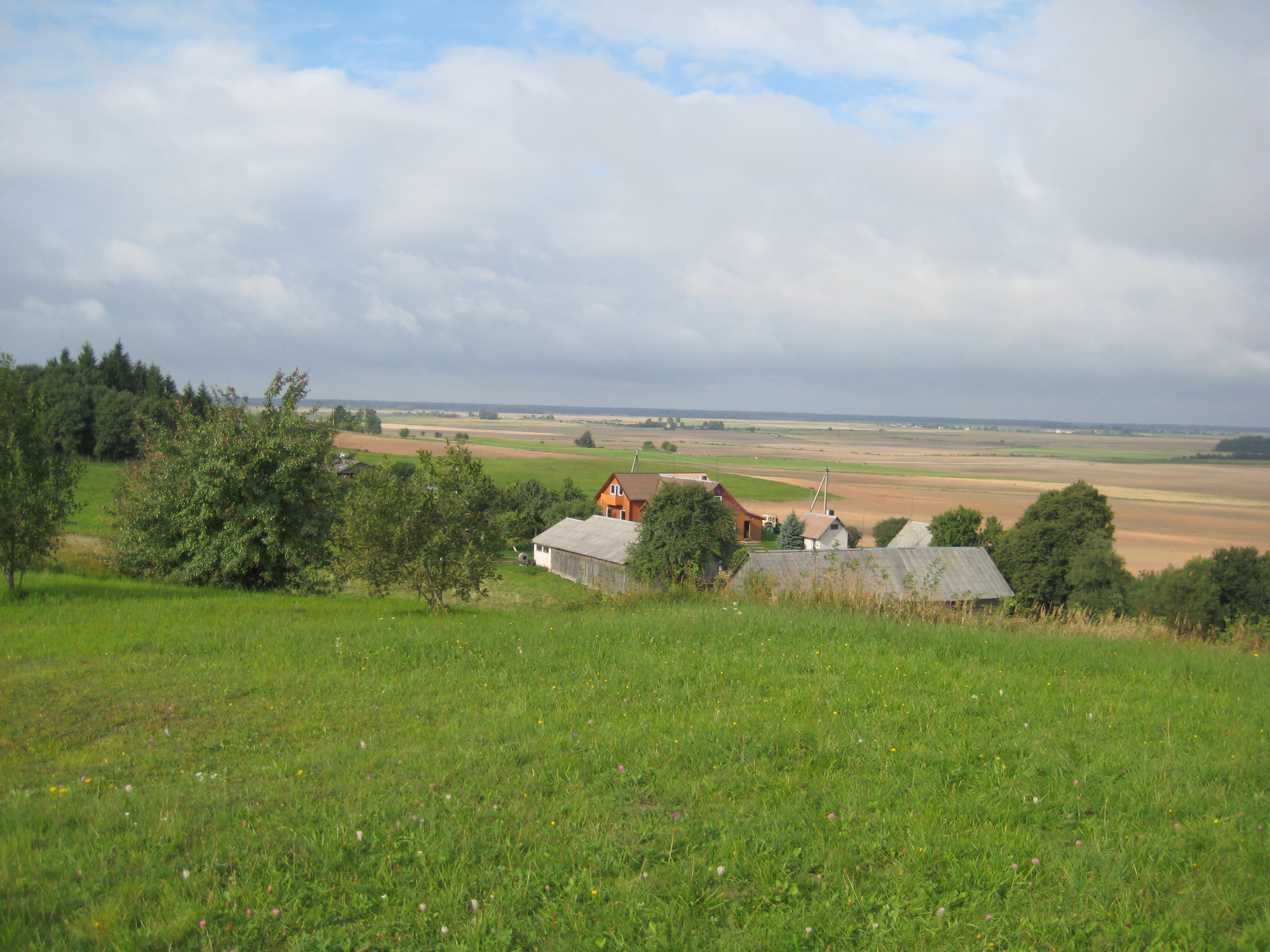 Kulvos sen., Lithuania